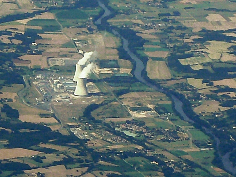 Vue aérienne de la centrale nucléaire de Civaux (Vienne, France)